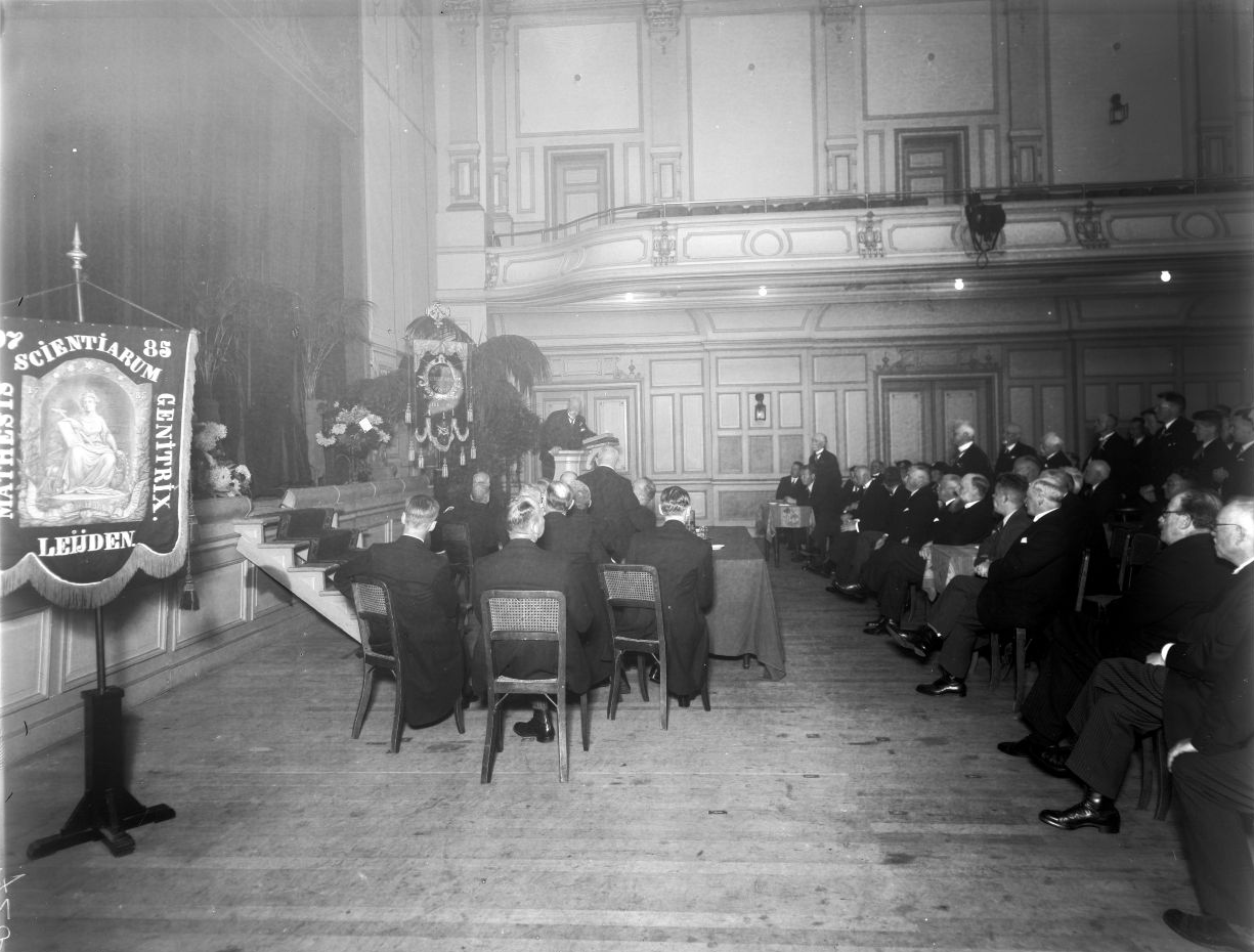 Beeld van de herdenkingsbijeenkomst van het 150-jarig bestaan van de M.S.G., gehouden in de Stadsgehoorzaal. Leiden, 1935.